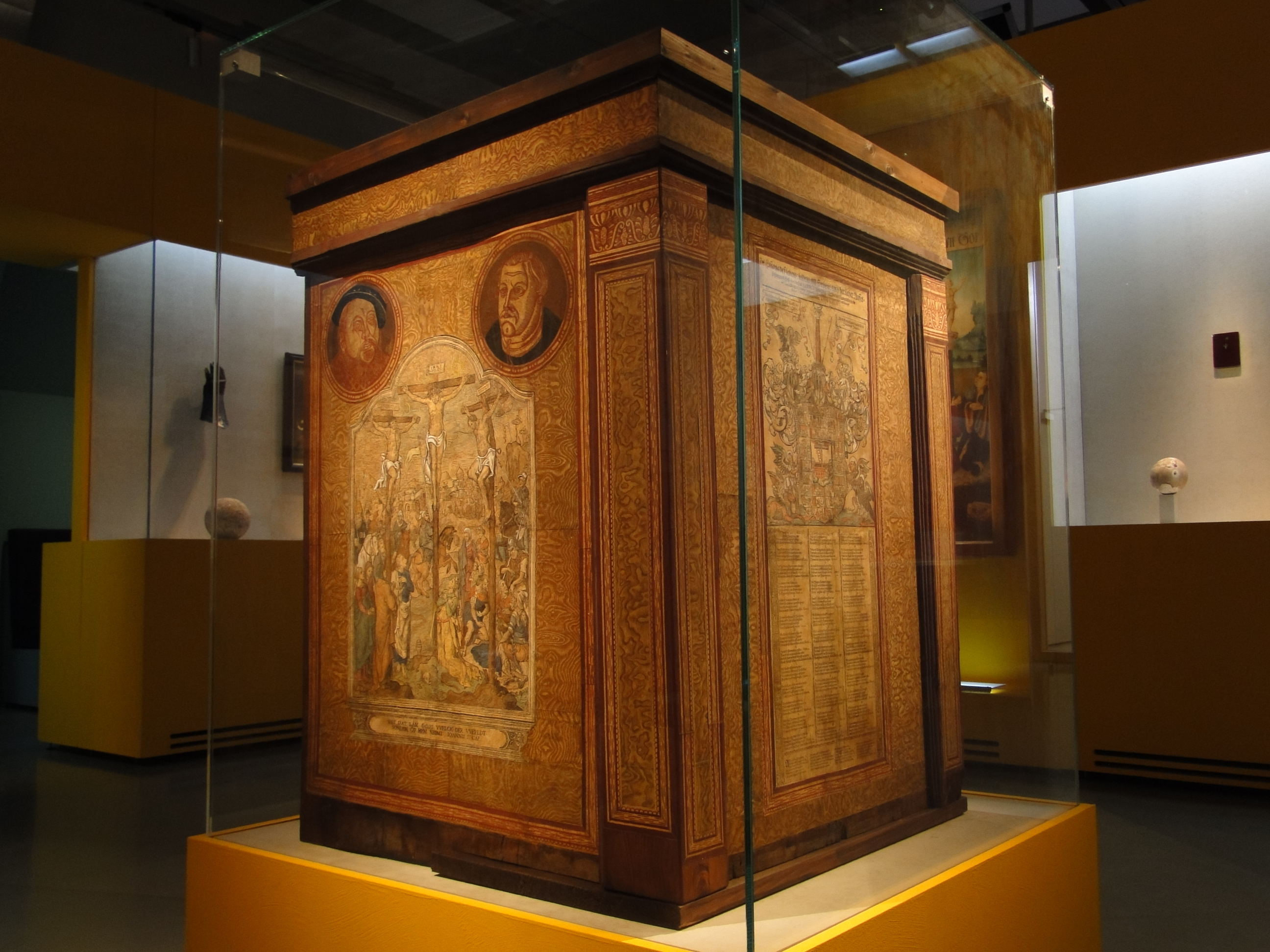 Flasernkanzel der Bartholomäuskirche in Dresden, heute Stadtmuseum Dresden; Fotografie mit erworbener Fotoerlaubnis